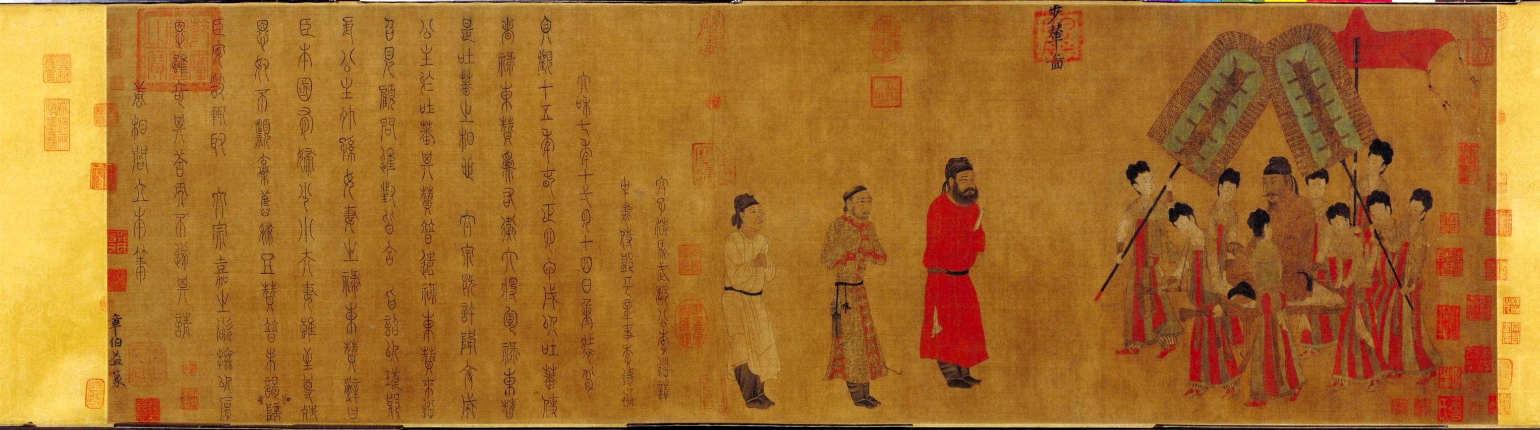 唐太宗在宫内接见松赞干布派来的吐蕃使臣禄东赞的情景。李世民端坐在由六名宫女抬着的坐榻（又称步辇，本图即以此为名）上，另有三个宫女分别在前后掌扇和持华盖。唐太宗面前站立三人：最右者，身穿大红袍，是这次仪式的引见官员；中间是吐蕃的使臣禄东赞，拱手而立，发型和服饰与中原地区不同；最左为一穿白袍的内官。